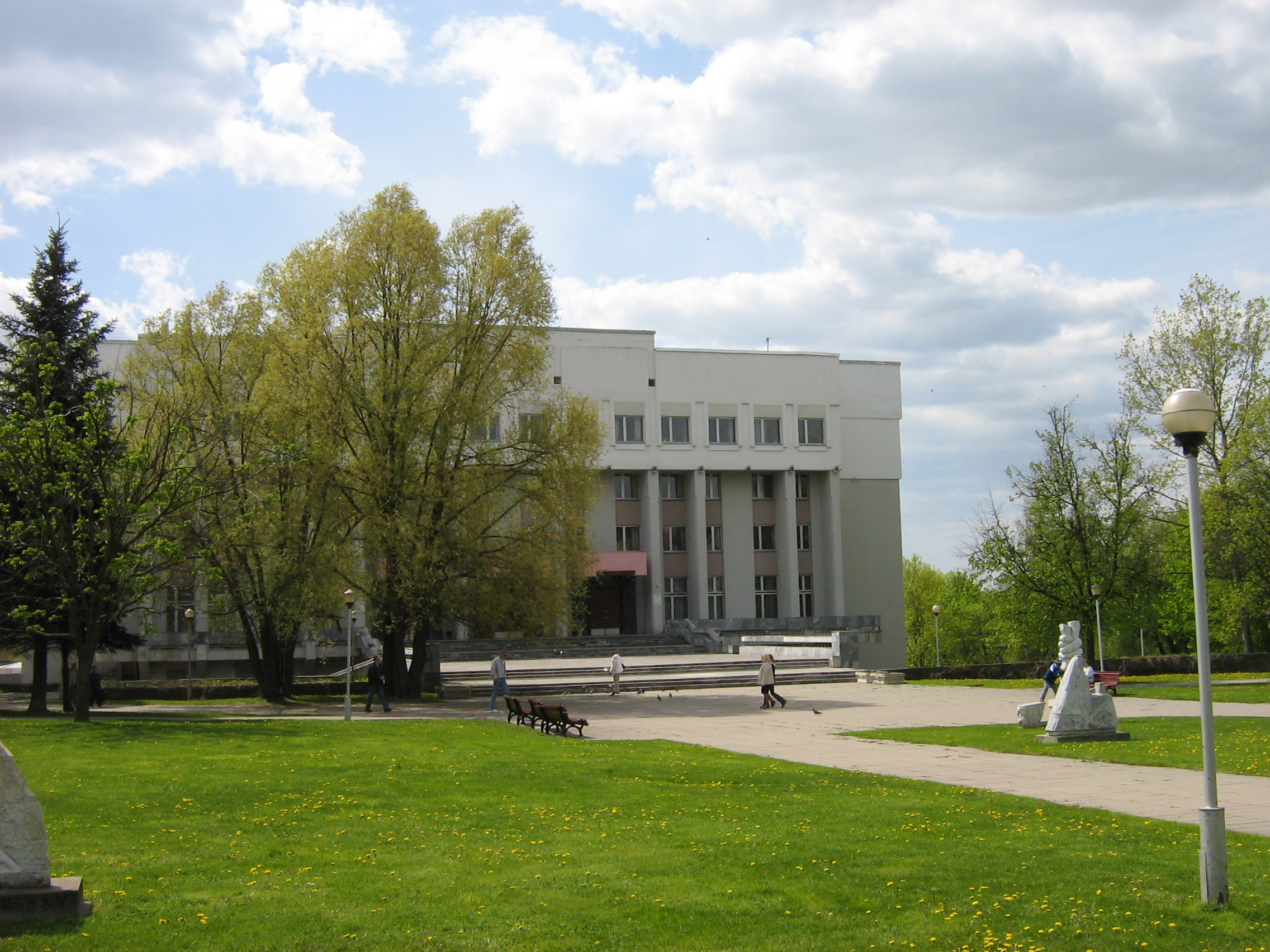 Филармония